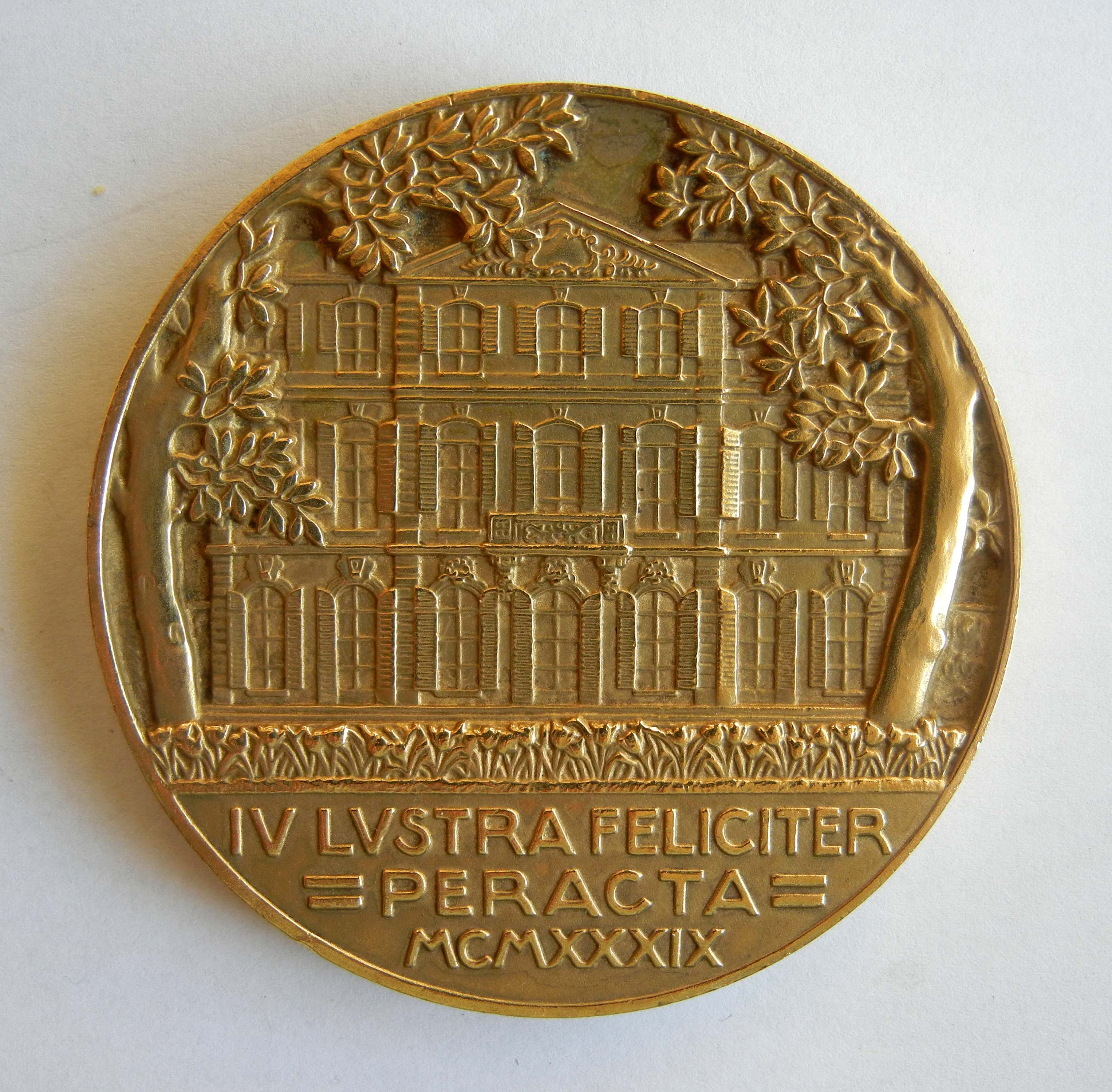 Médaille John Loudun (1866 – 1955) Ambassadeur hollandais à Paris de 1919 à 1940 IV LVSTRA FELICITER PERACTA Graveur : Jean de VERNON en bronze Diamètre 68 mm Poids 159 grs